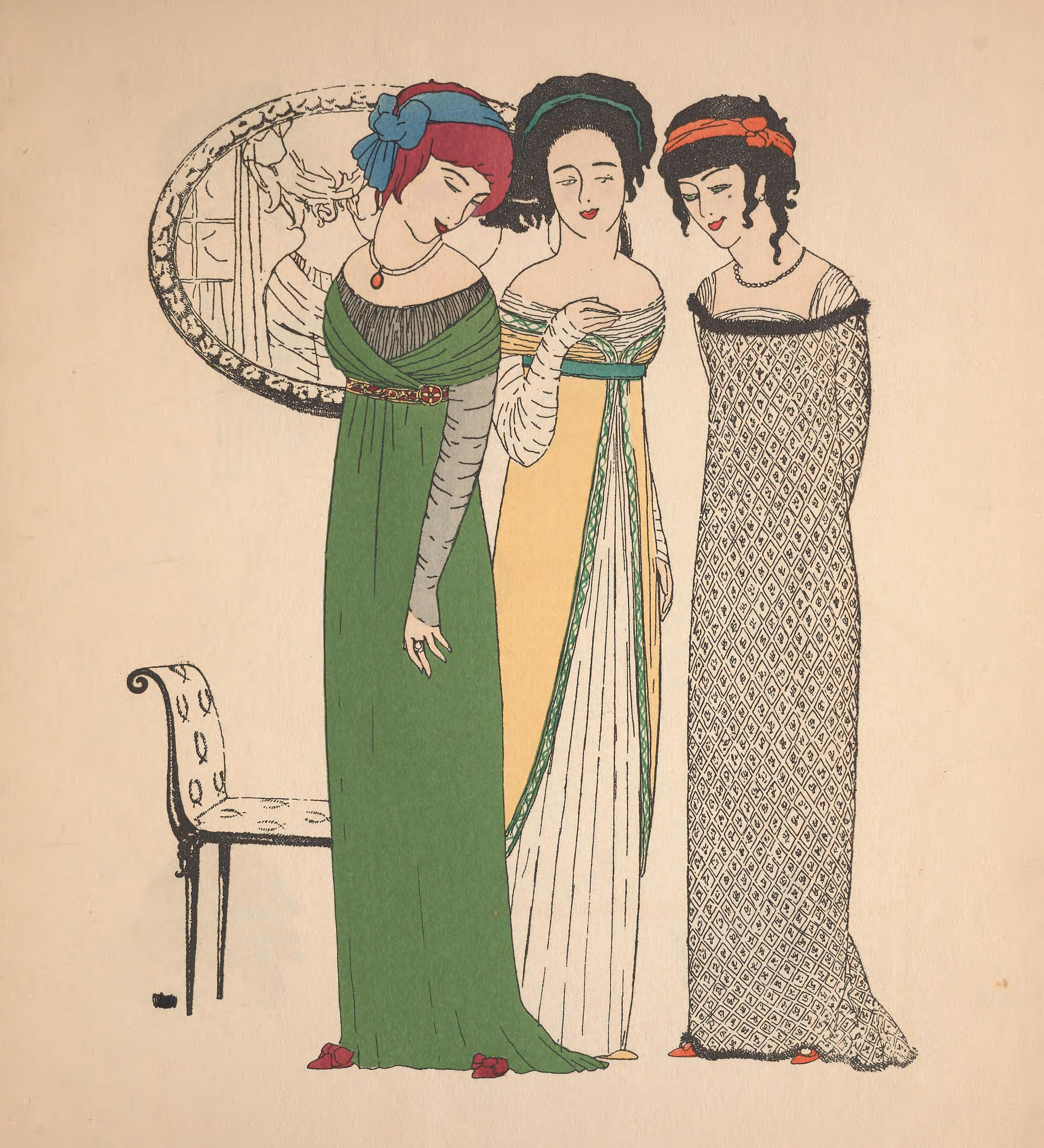 Illustration of three Paul Poiret dresses. Les Robes de Paul Poiret, p.21.